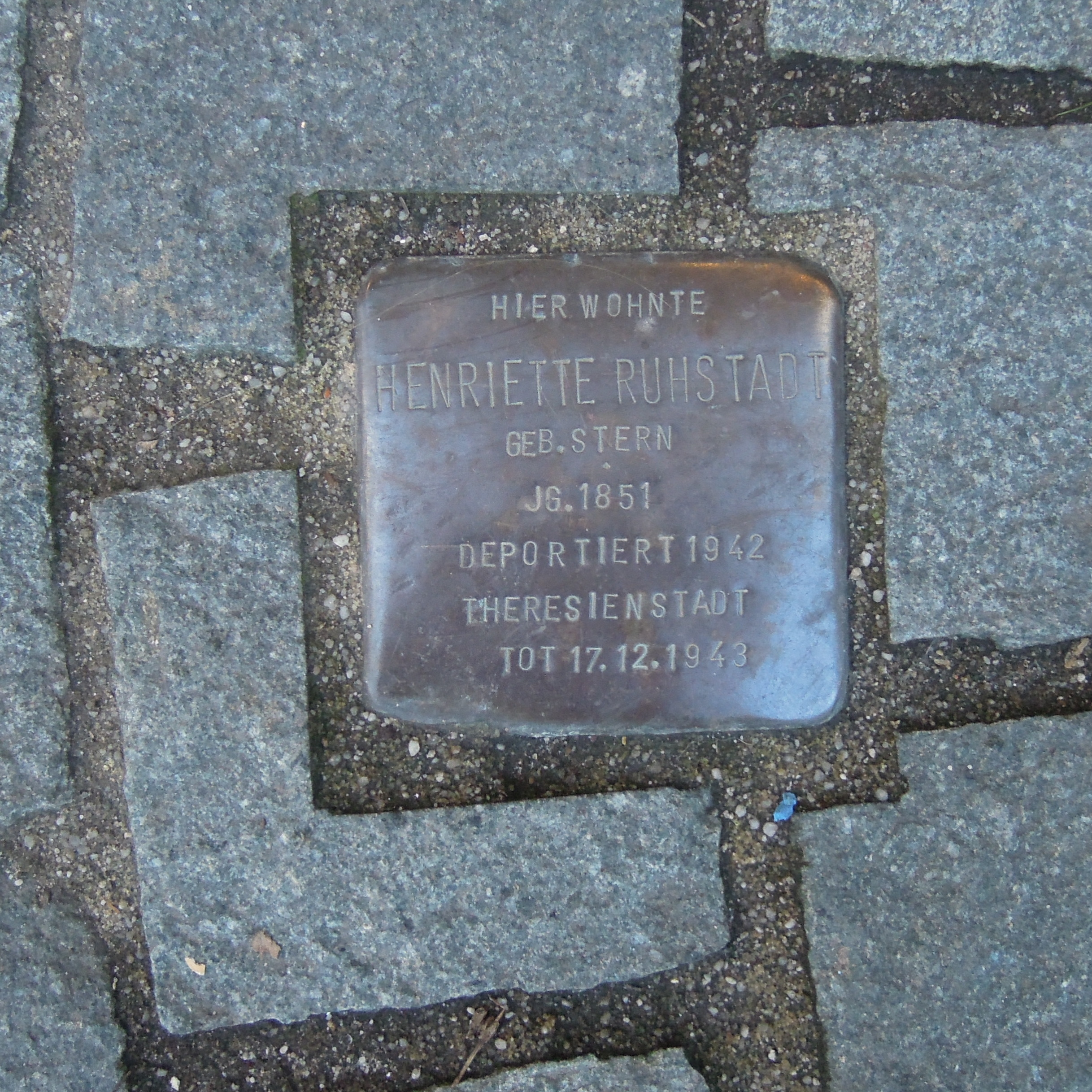 Stolperstein in Soest Am Seel 8, Henriette Ruhstadt